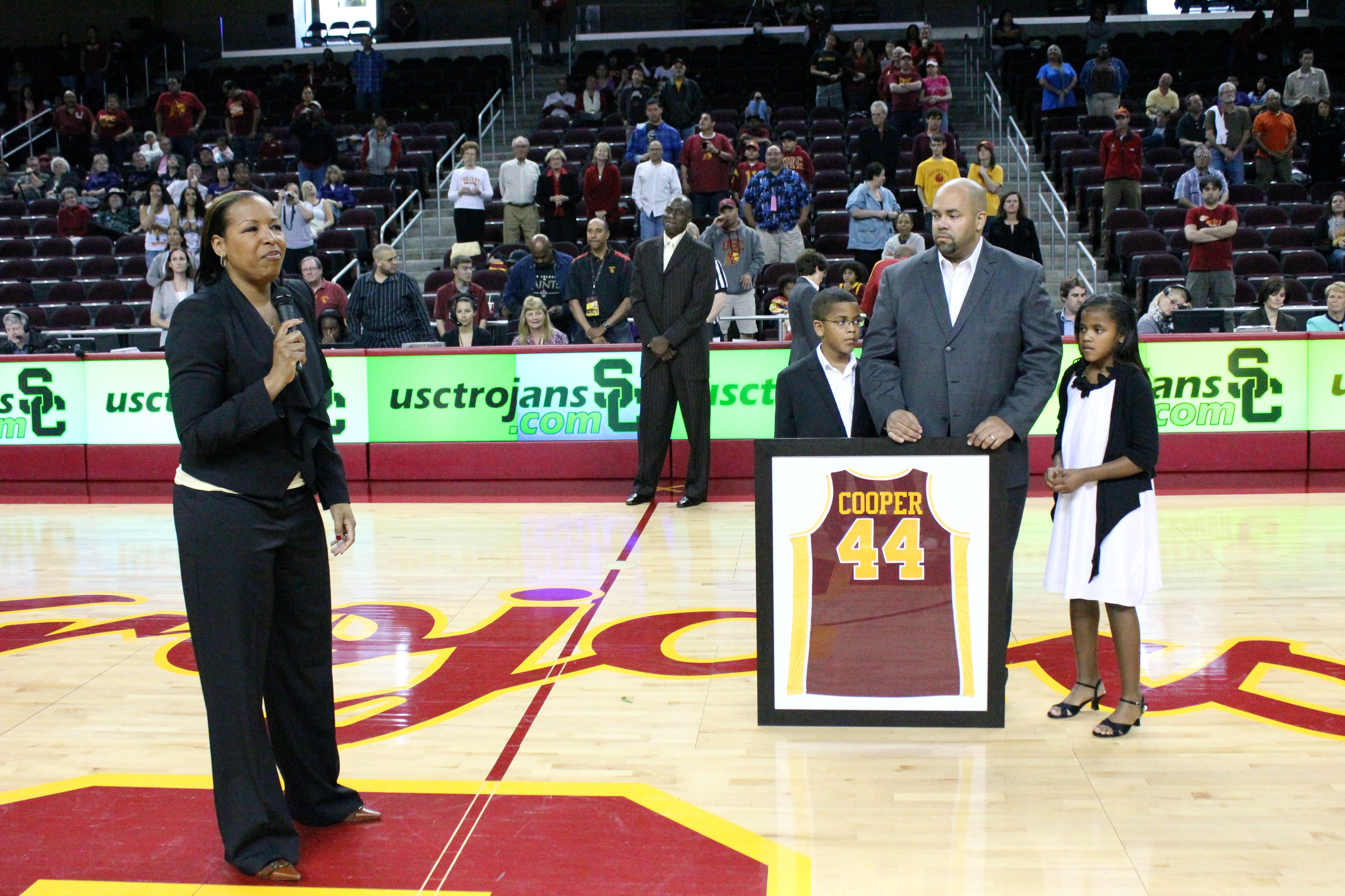 Cérémonie de retrait du retrait du numéro 44 porté à USC par la basketteuse Cynthia Cooper